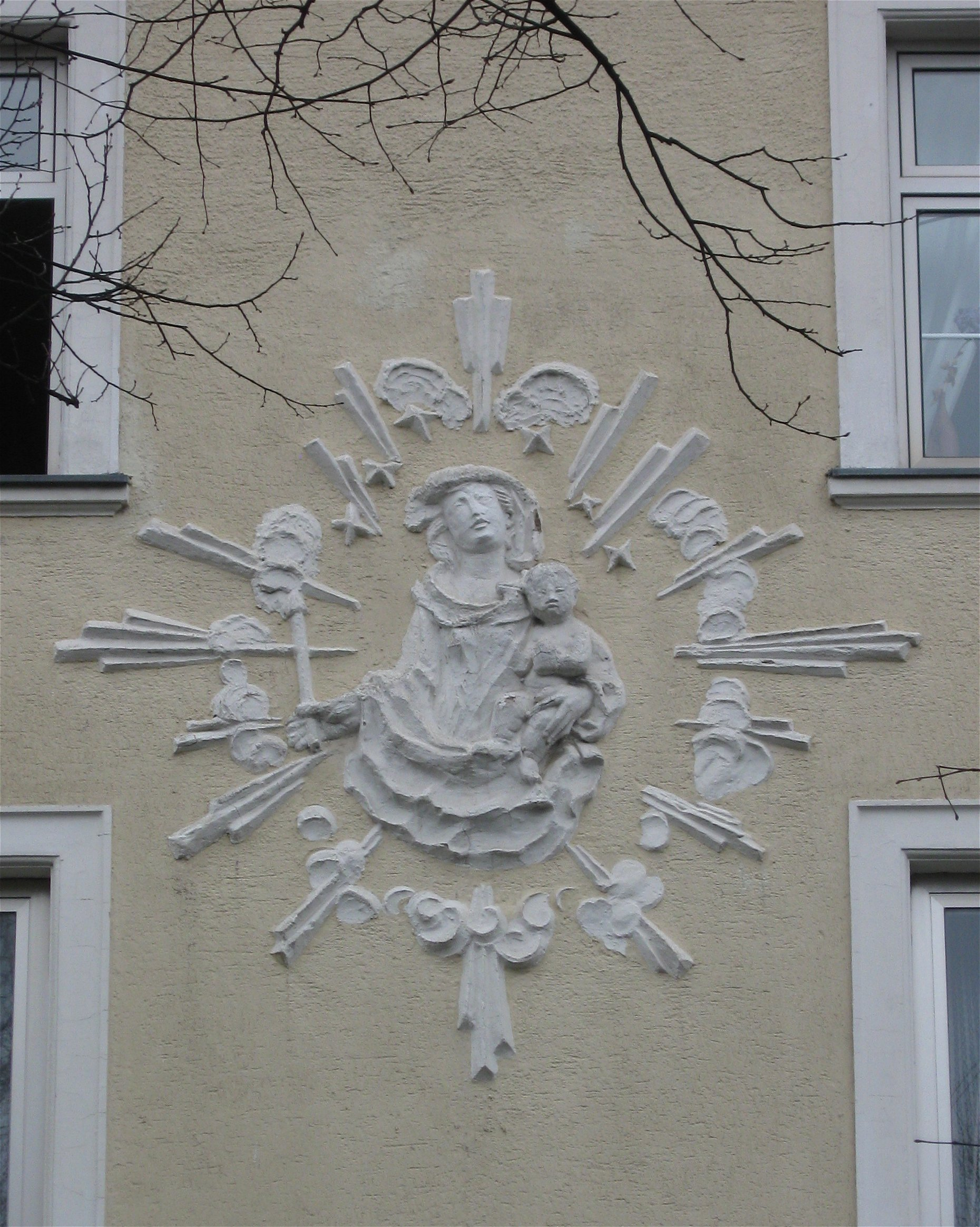 Adalbertstraße 90; Mietshaus, deutsche Renaissance, mit Holzloggia und Muttergottes-Stuckrelief, um 1900.